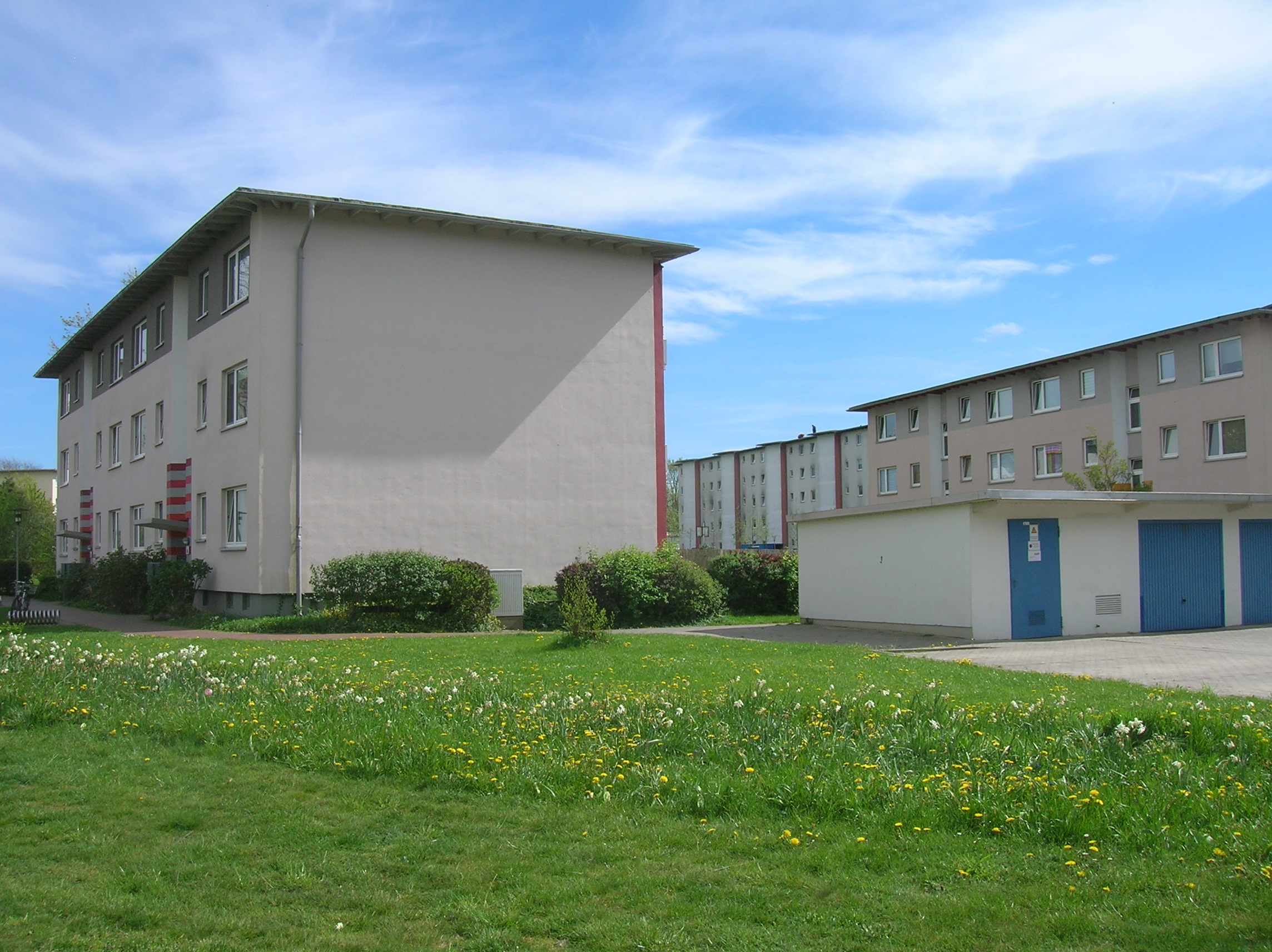 Wohnblocks in Grünhöfe, Bremerhaven-Geestemünde